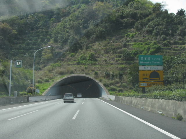 2009年4月1日、日本坂トンネル入口付近で撮影